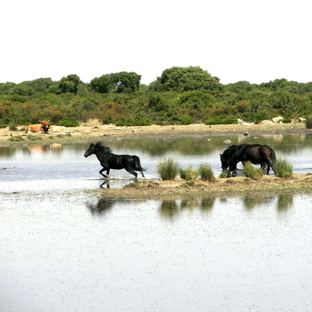 Cavallini al pascolo